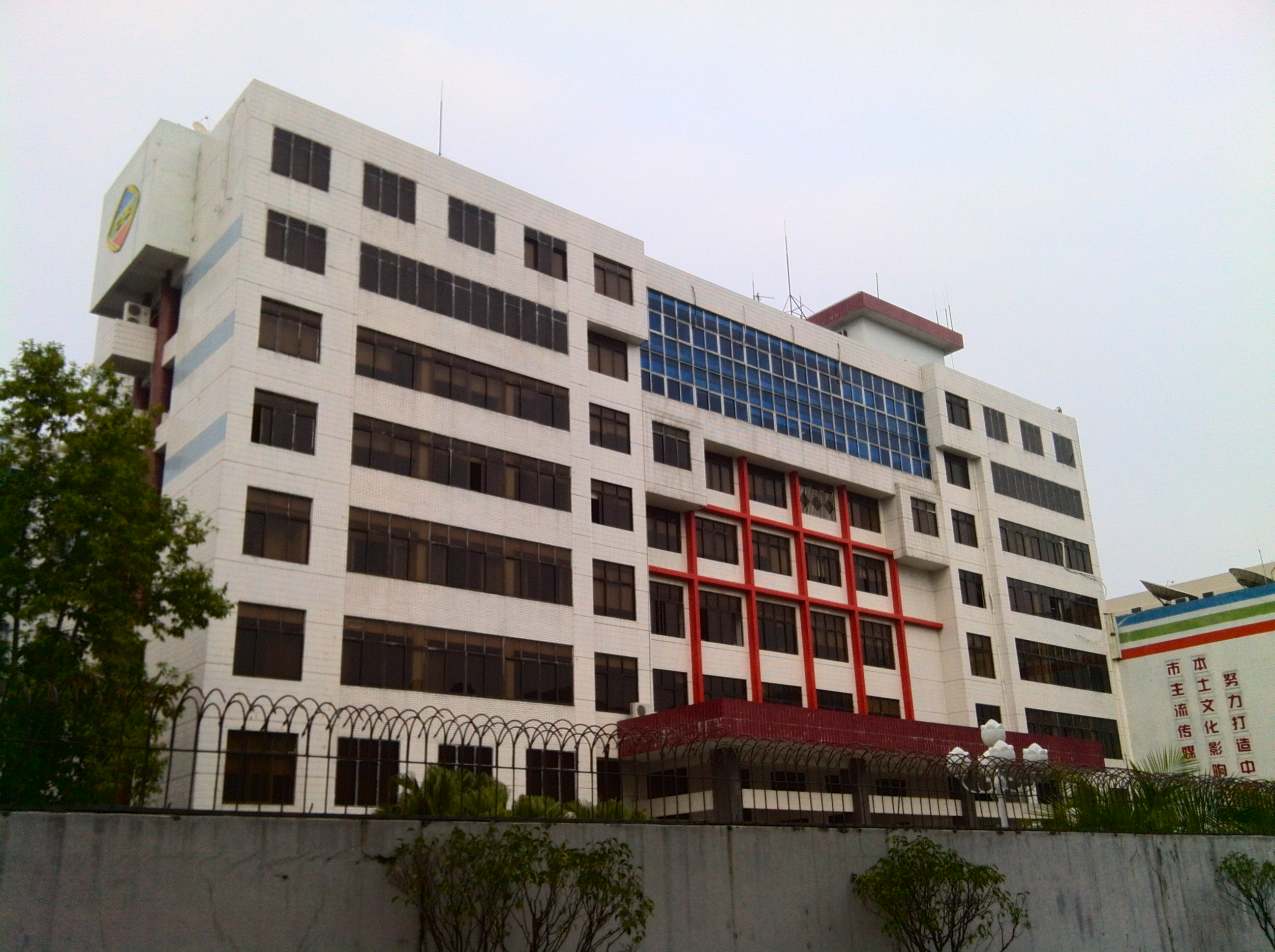 中文（中国大陆）: 潮州广播电视台大楼，位于中华人民共和国广东省潮州市湘桥区西荣路48号。